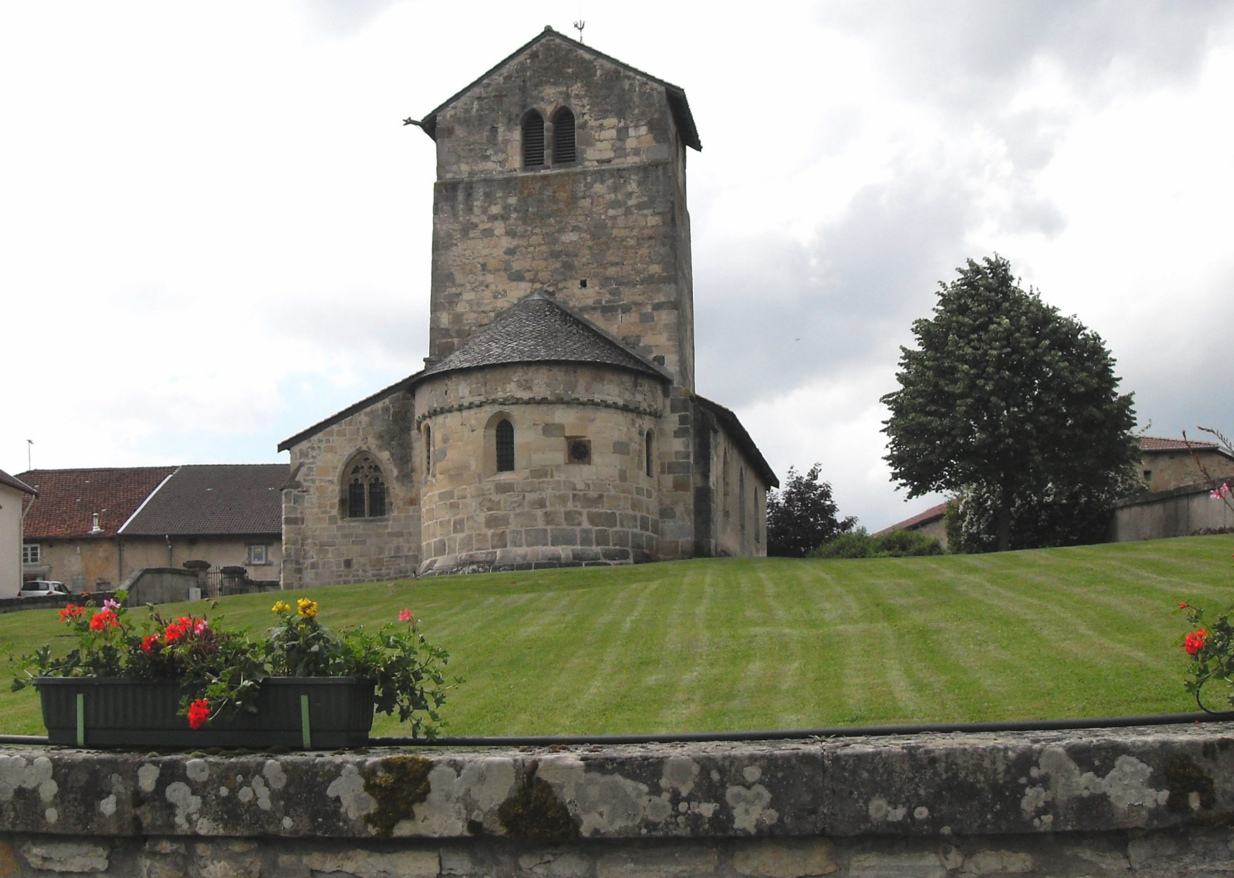 L'église Saint-Jean-Baptiste de Laviéville à Dompaire